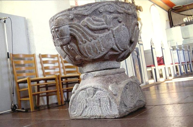 Sjørslev Kirke, døbefont.